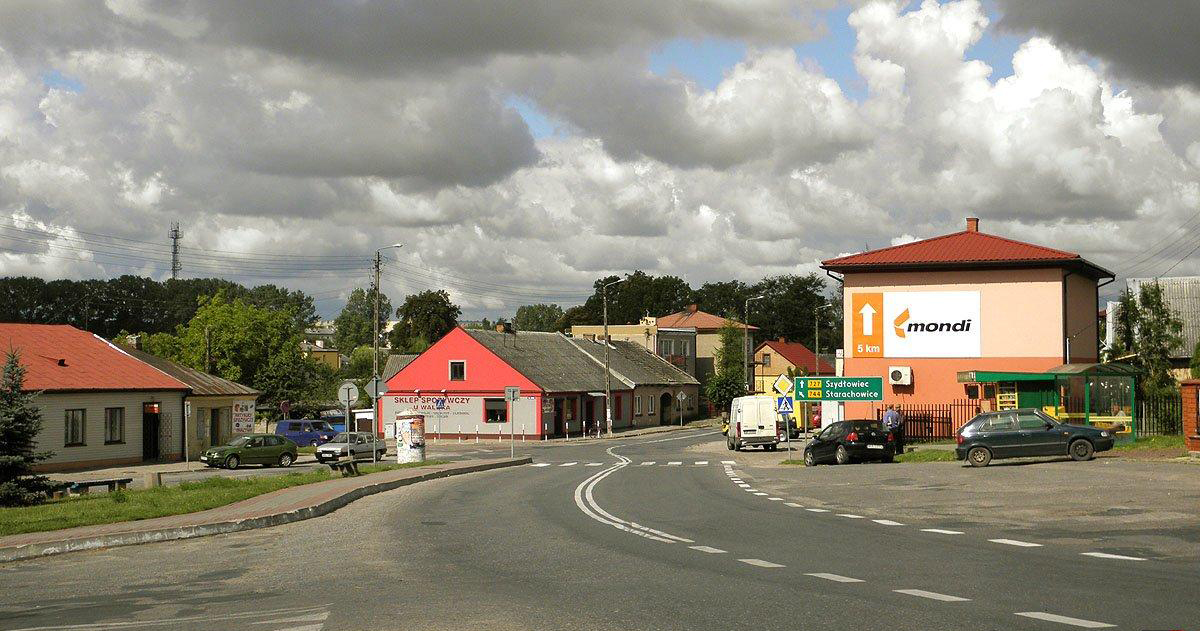 Zabudowa Wierzbicy, widok ze schodów kościoła św.Stanisława.